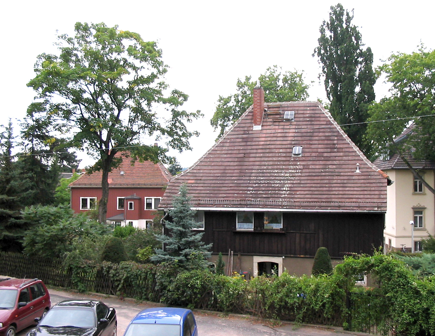 Radebeul, Unteres Berghaus, Nordseite, links hinten Haus Liborius